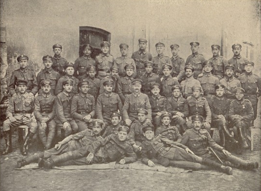 Kompania śląska w Warszawie w roku 1916. Na zdjęciu płk Hieronim Przepiliński, Olej, Ćwiękała.